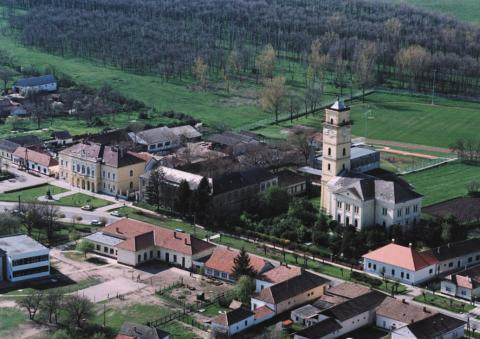 Kunmadaras, Hungary, aerialphotography